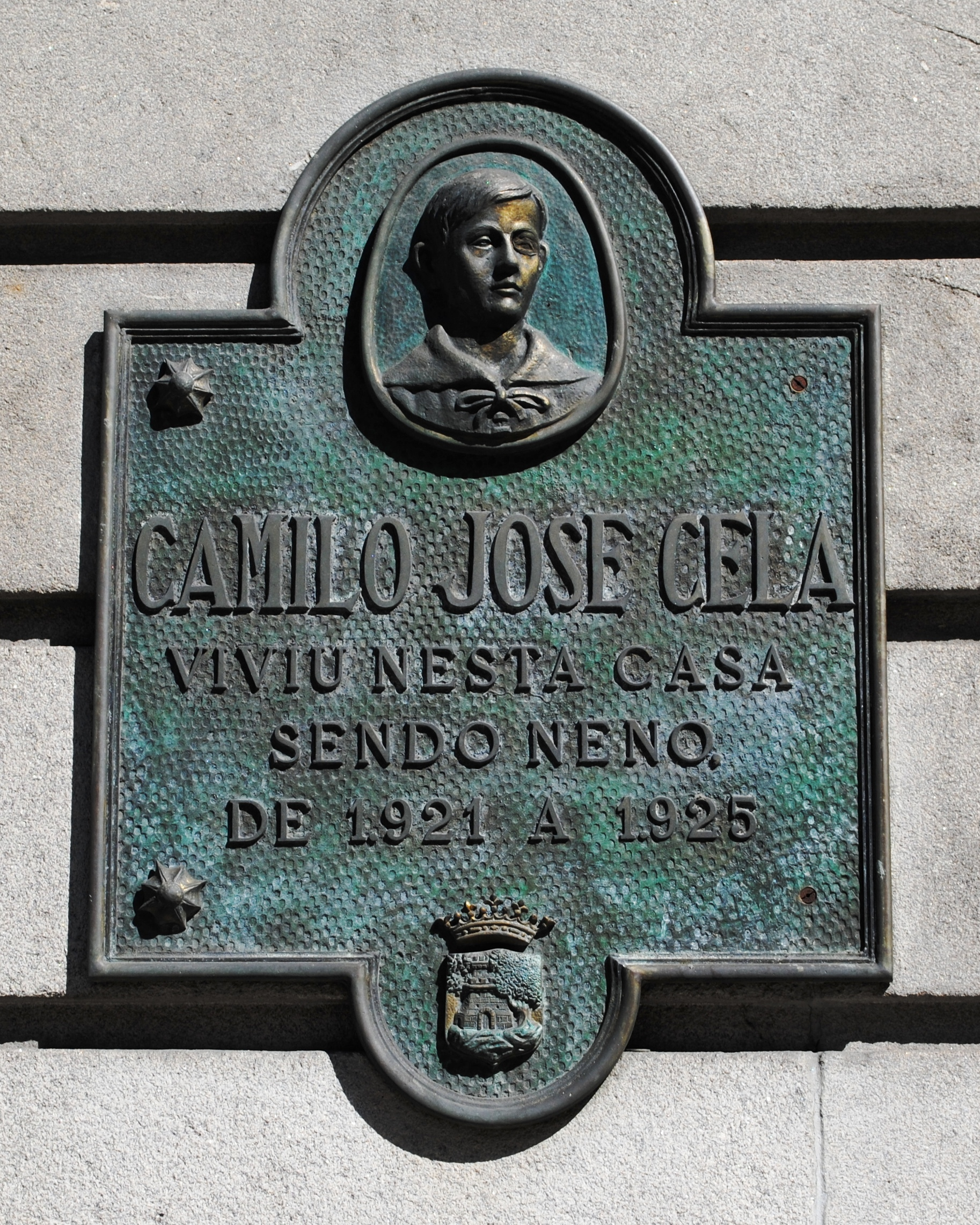 Banco de Galicia, Vigo, Camilo José Cela viviu...